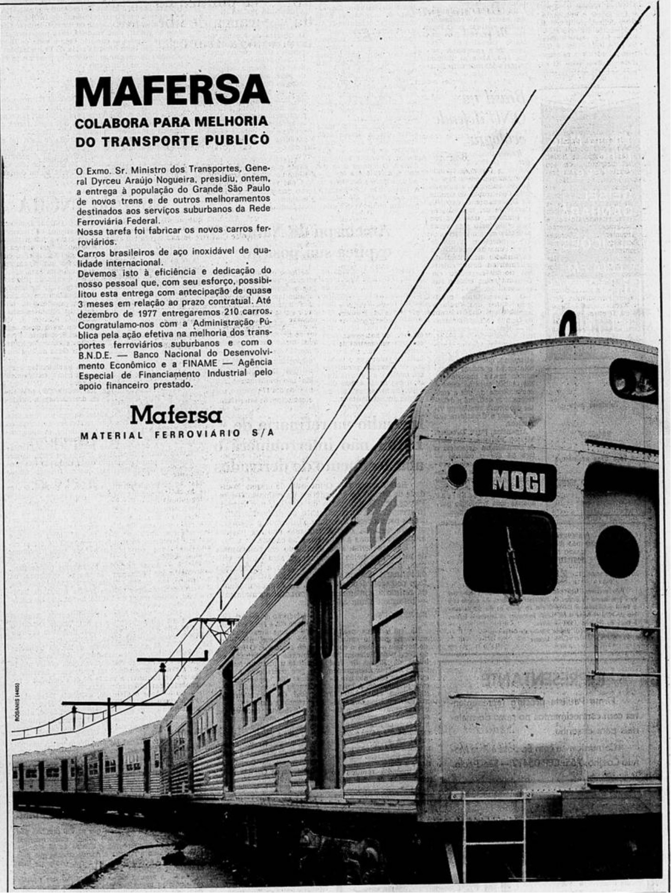 Anúncio publicitário da Mafersa sobre a entrega de novos trens para a Rede Ferroviária Federal S/A. Esse anúncio publicado nos principais jornais brasileiros.